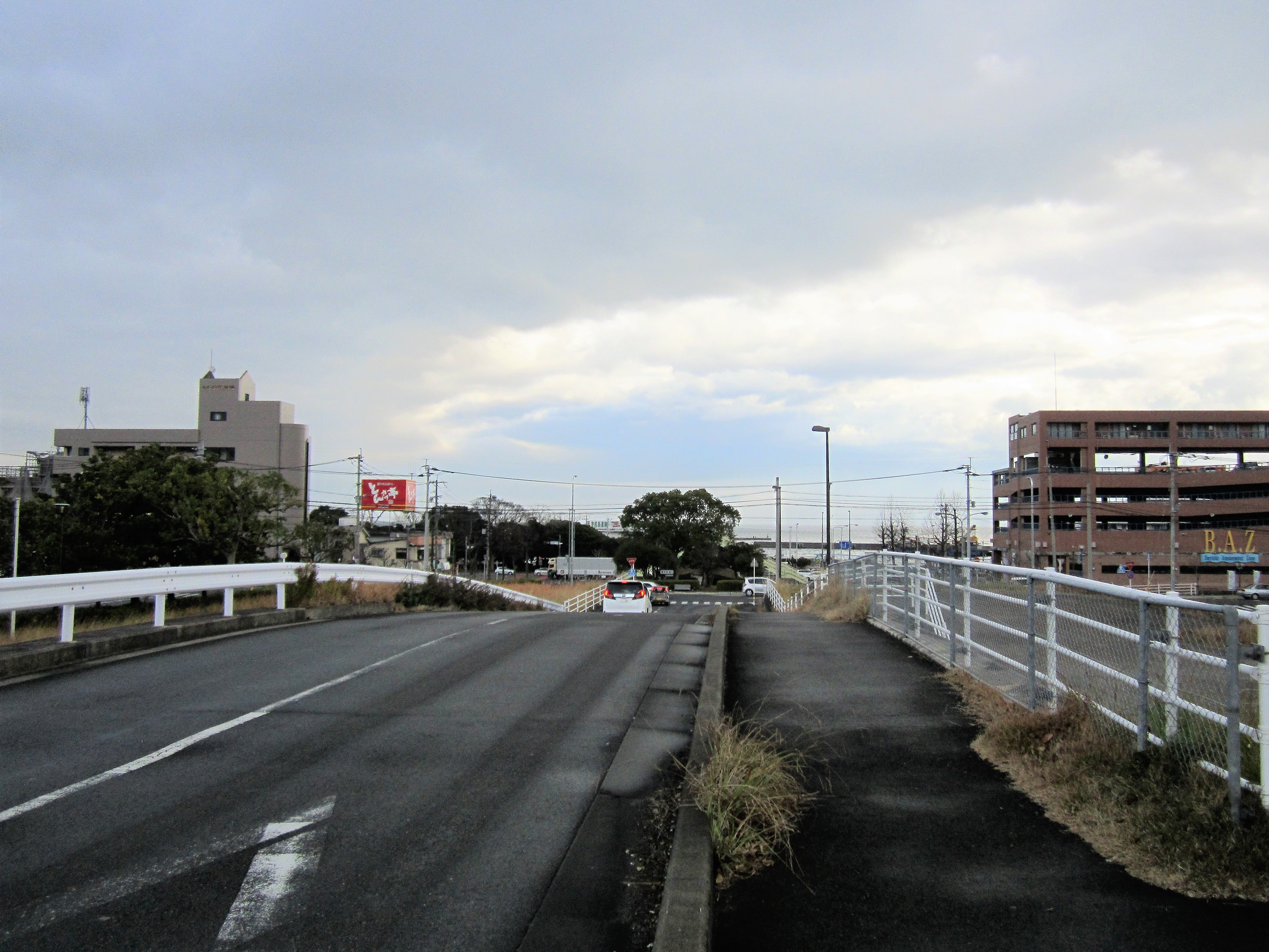 新別府駅予定地（改修された吉弘踏切と観光港を結ぶ道路） Canon PowerShot A2200